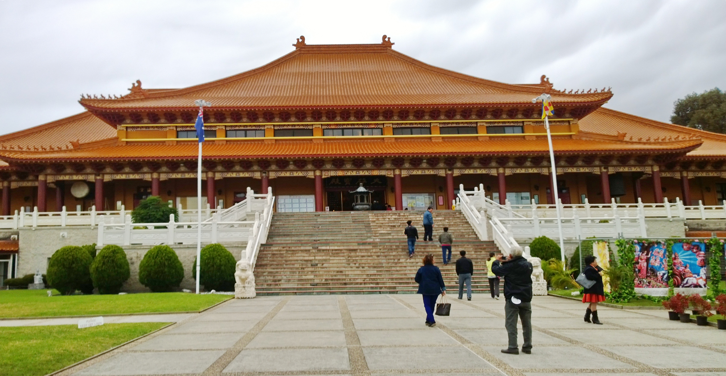 Berkeley NSW 2506, Australia